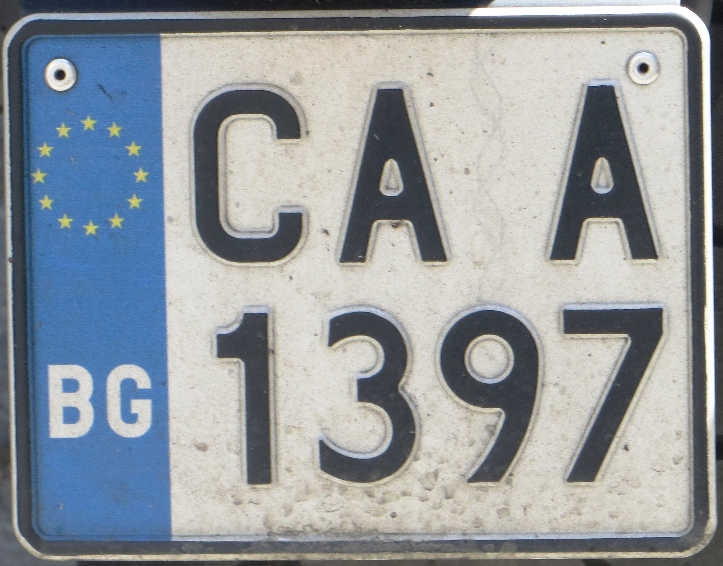 Motorfiets Bulgarije kentekenplaat